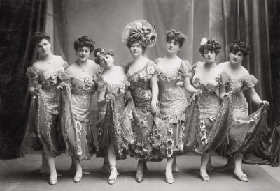 Die Grisetten aus der Operette "Die lustige Witwe" von Franz Lehar im Theater an der Wien.